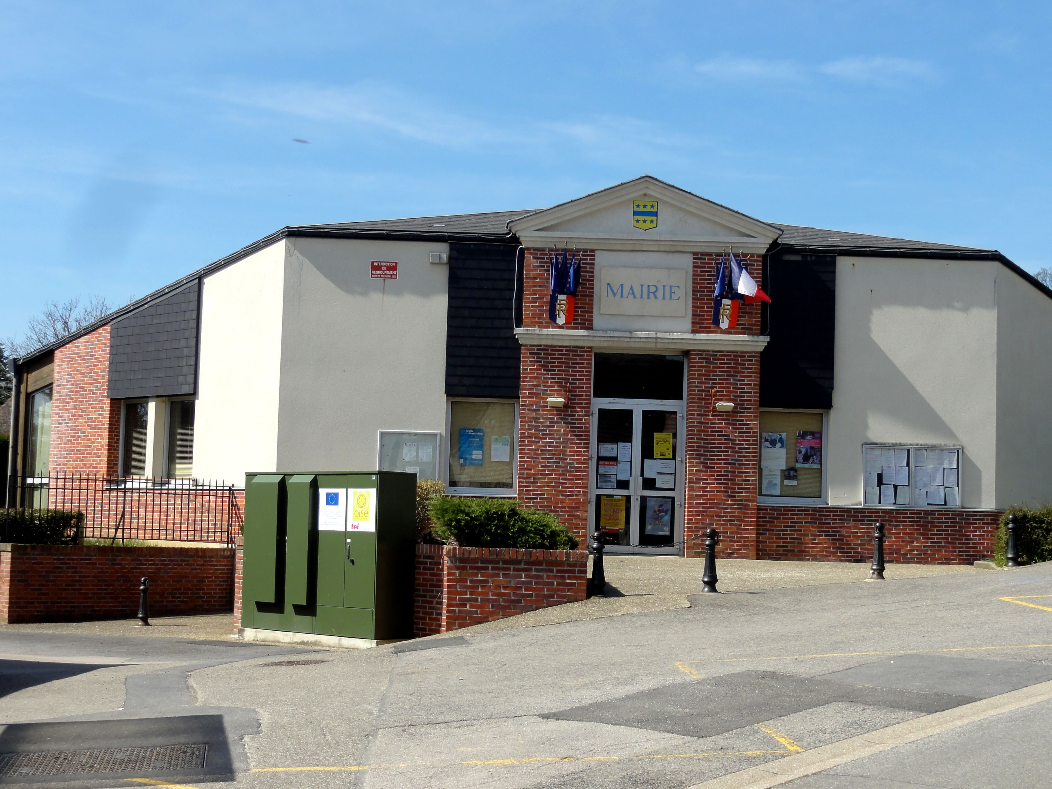 Mairie, rue des Tilleuls.